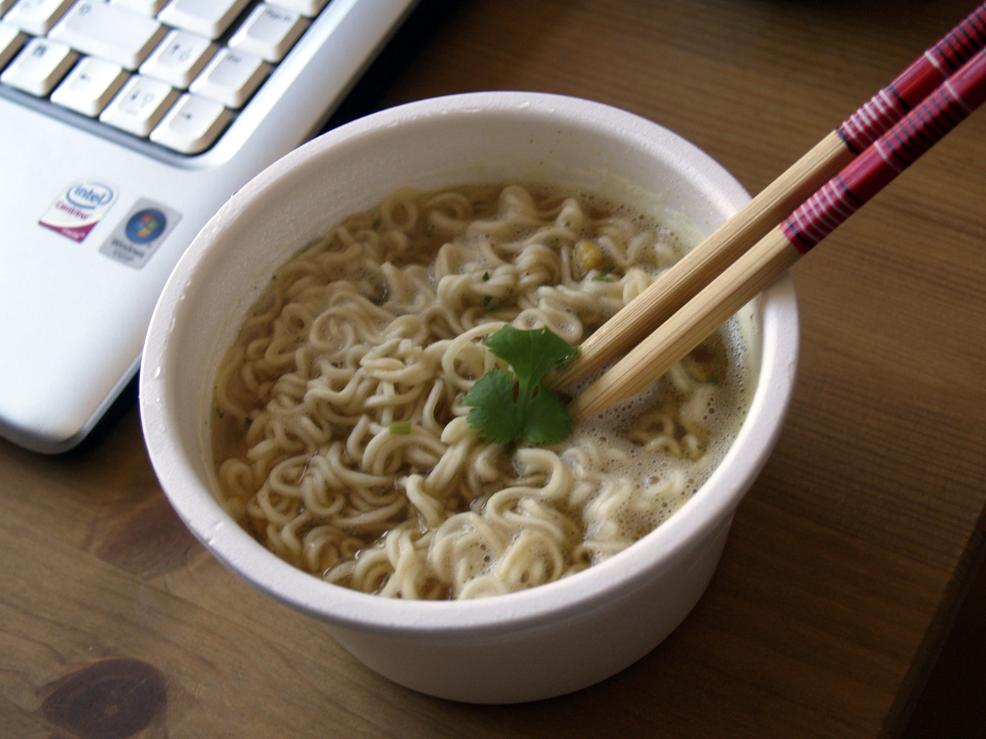 Nudelsuppe